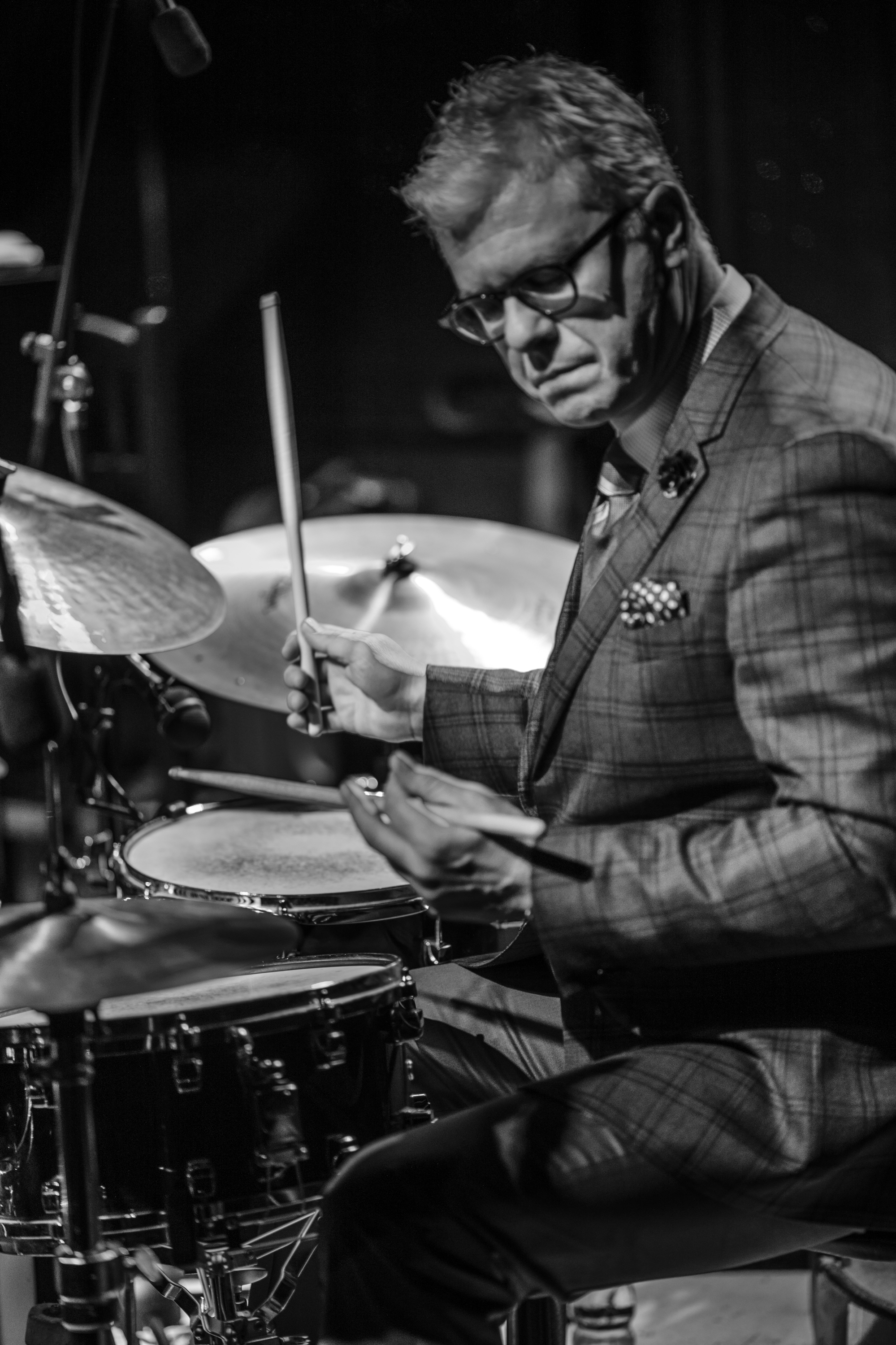 Ehud Asherie / piano David Wong / bajo Matt Wilson / batería Ken Peplowski / clarinete y saxo Invitado especial: Paquito D’Rivera / saxo 21 Festival Internacional de Jazz de Punta del Este El Sosiego, Punta del Este, Maldonado, Uruguay Camera: Canon EOS 5D Mark IV Lens: Zeiss Makro-Planar T* 2/100 ZE 0 ISO: 400